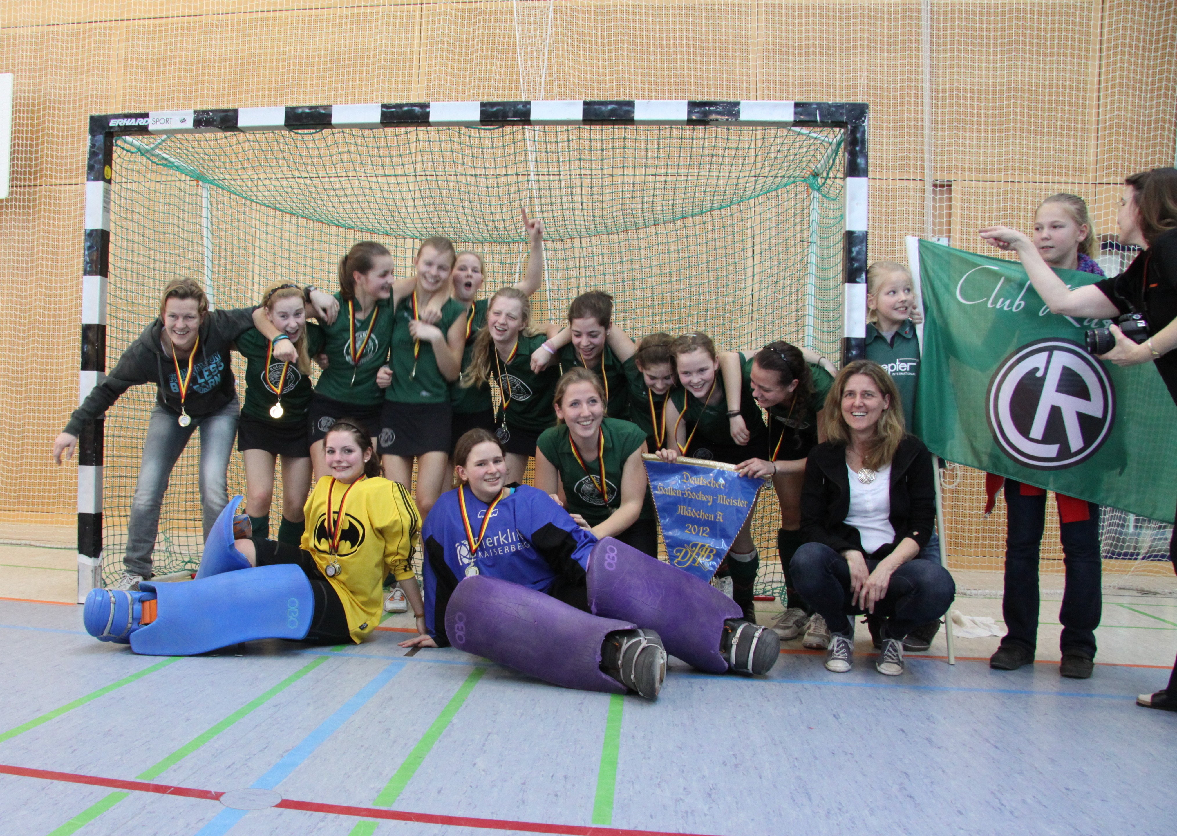 Deutscher Hallenmeister Mädchen A 2012